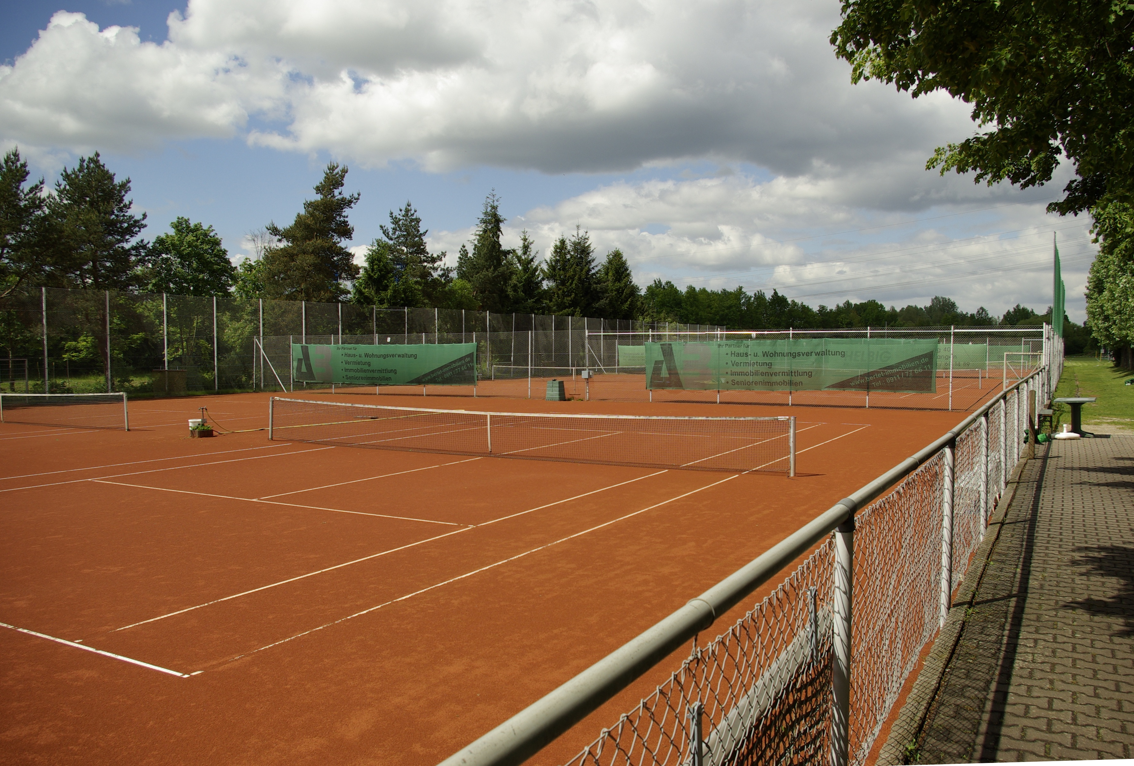 Sportanlage Langenau im Erlanger Stadtteil Eltersdorf